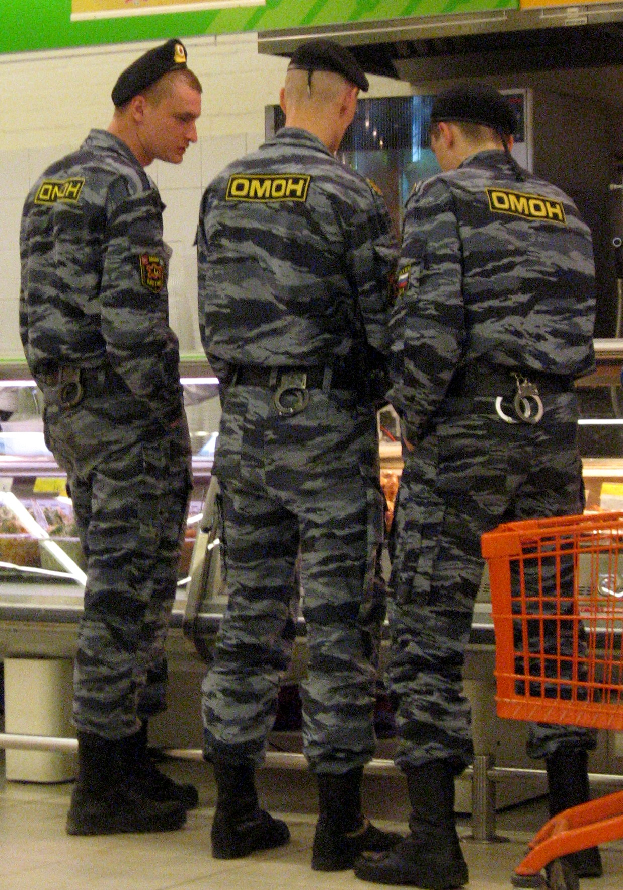 Příslušníci jednotek OMON v Petrohradě